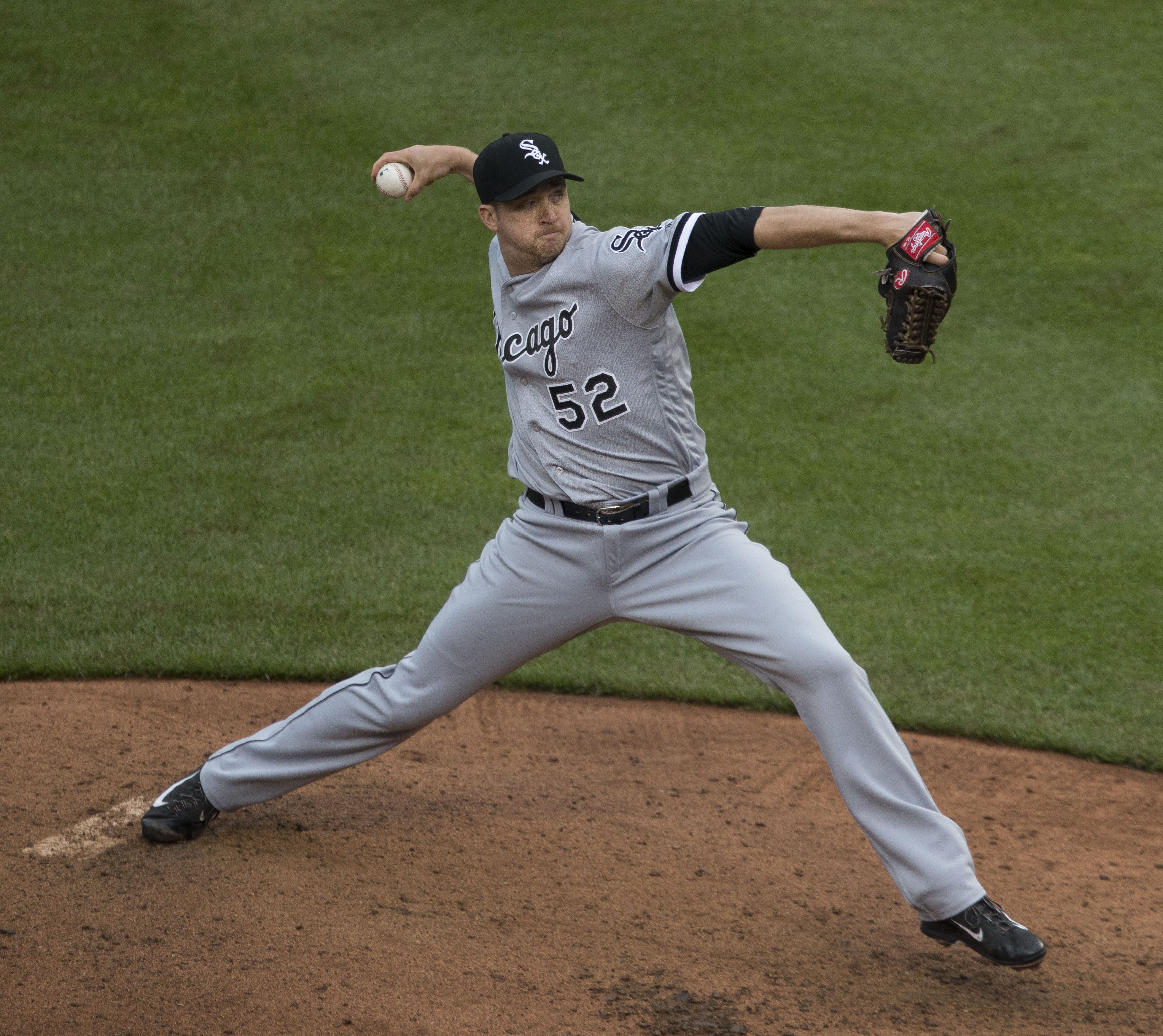 Jake Petricka